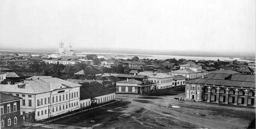 Tikhvin Square, Irkutsk, 1865